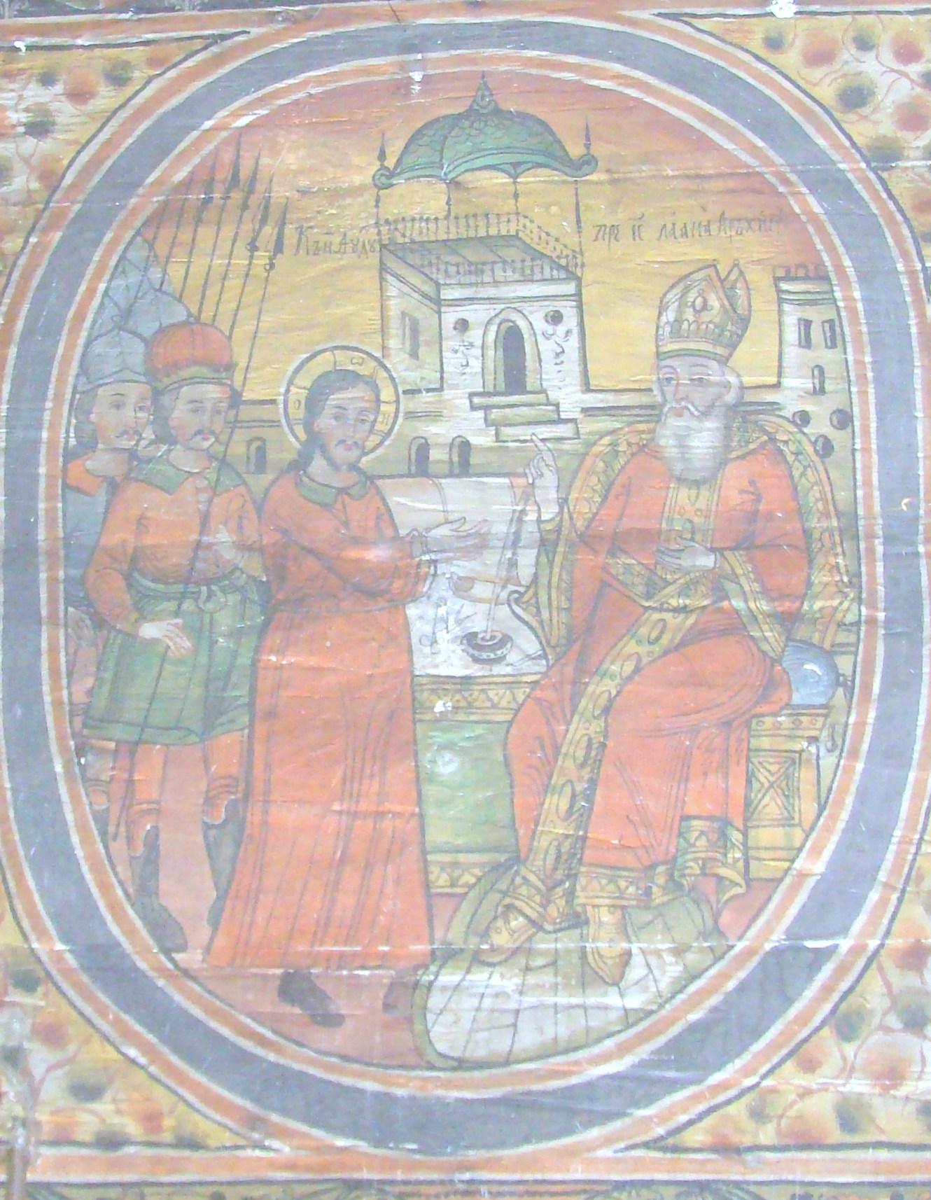 Biserica de lemn din Sartăș